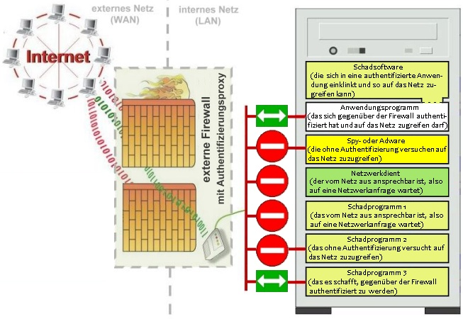 Externe Firewall mit Authentifizierungsproxy - Möglichkeiten und Grenzen